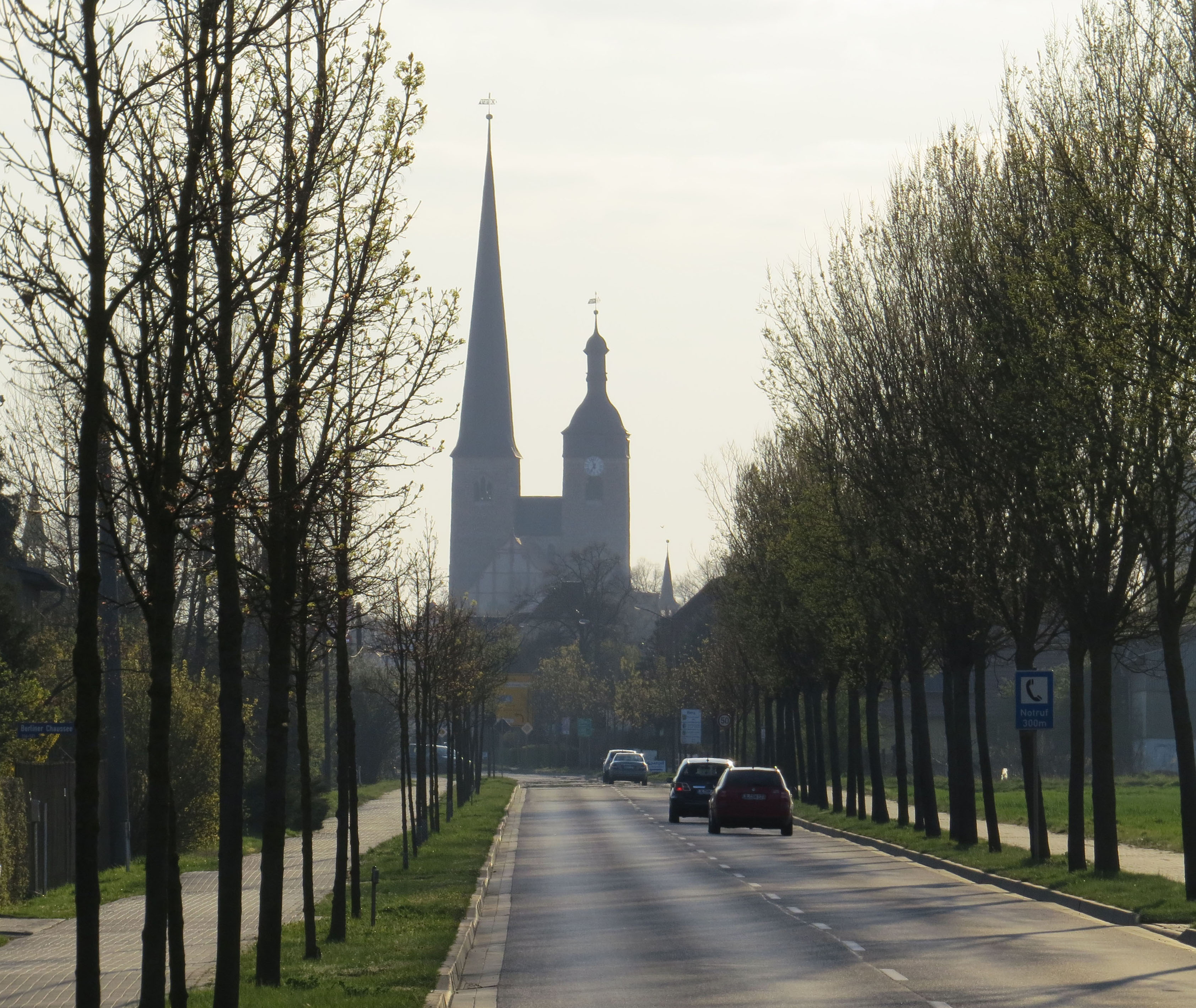 Oberkirche Unser Lieben Frauen in Burg (bei Magdeburg)